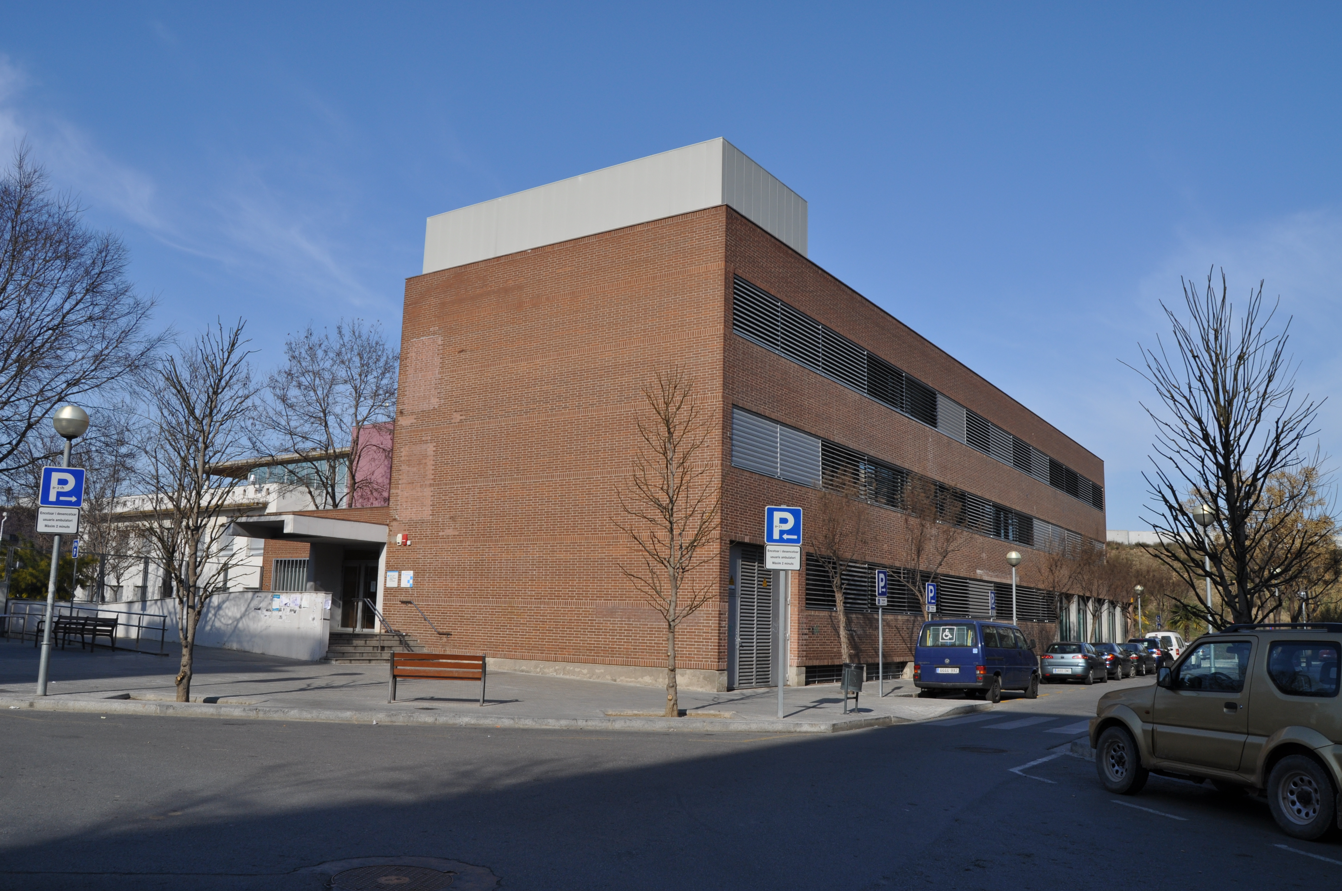 Mollet del Vallès: Centre d'assistencia primaria de Can Pantiquet. A l'esquerra, el carrer Lluís Millet i, a la dreta, el carrer Joaquim Mir.